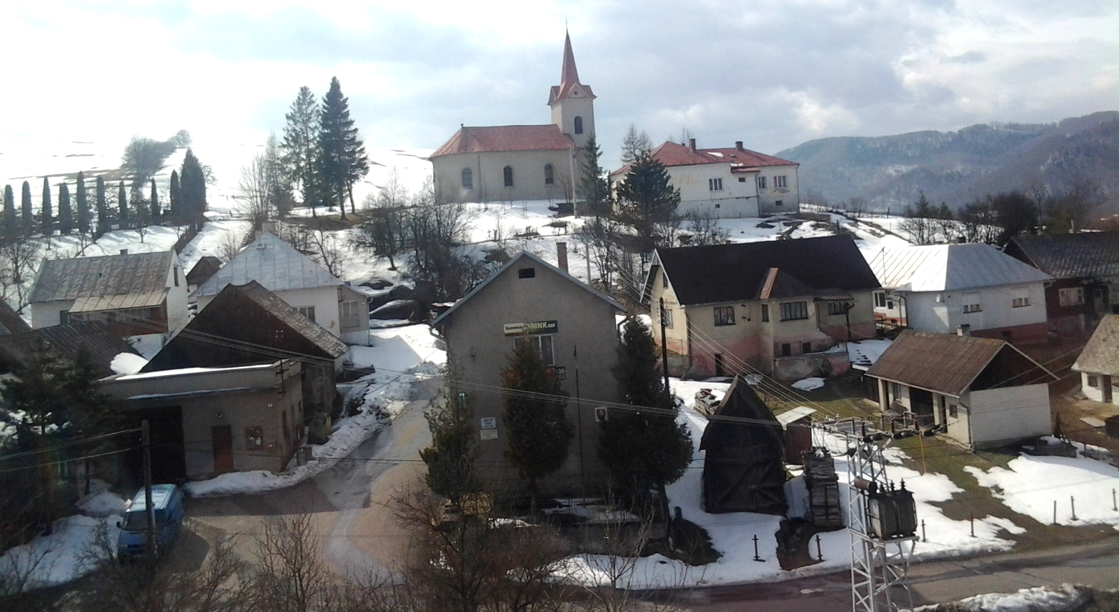 Obručné (apríl 2013)